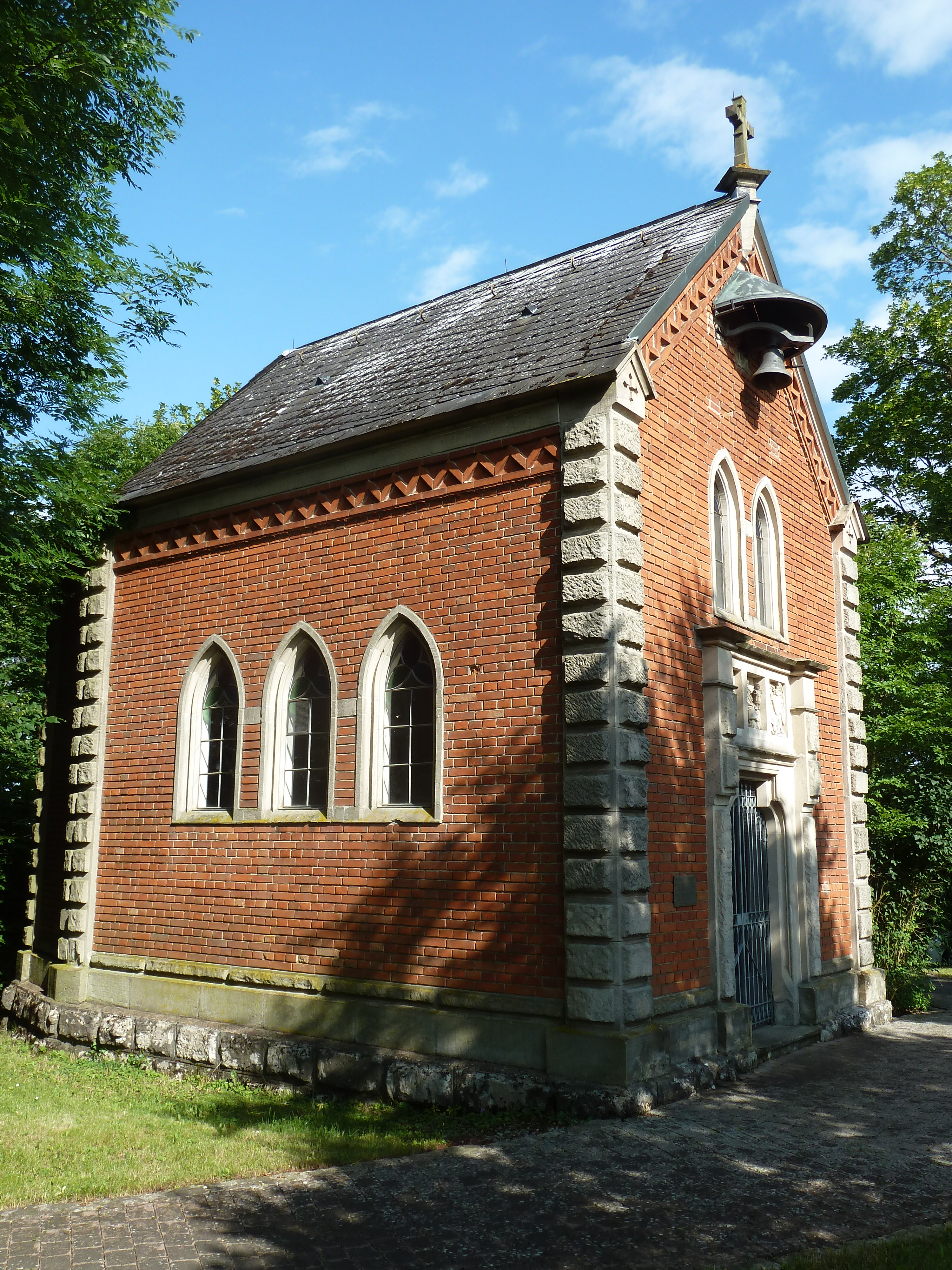 Südfassade der Kapelle.